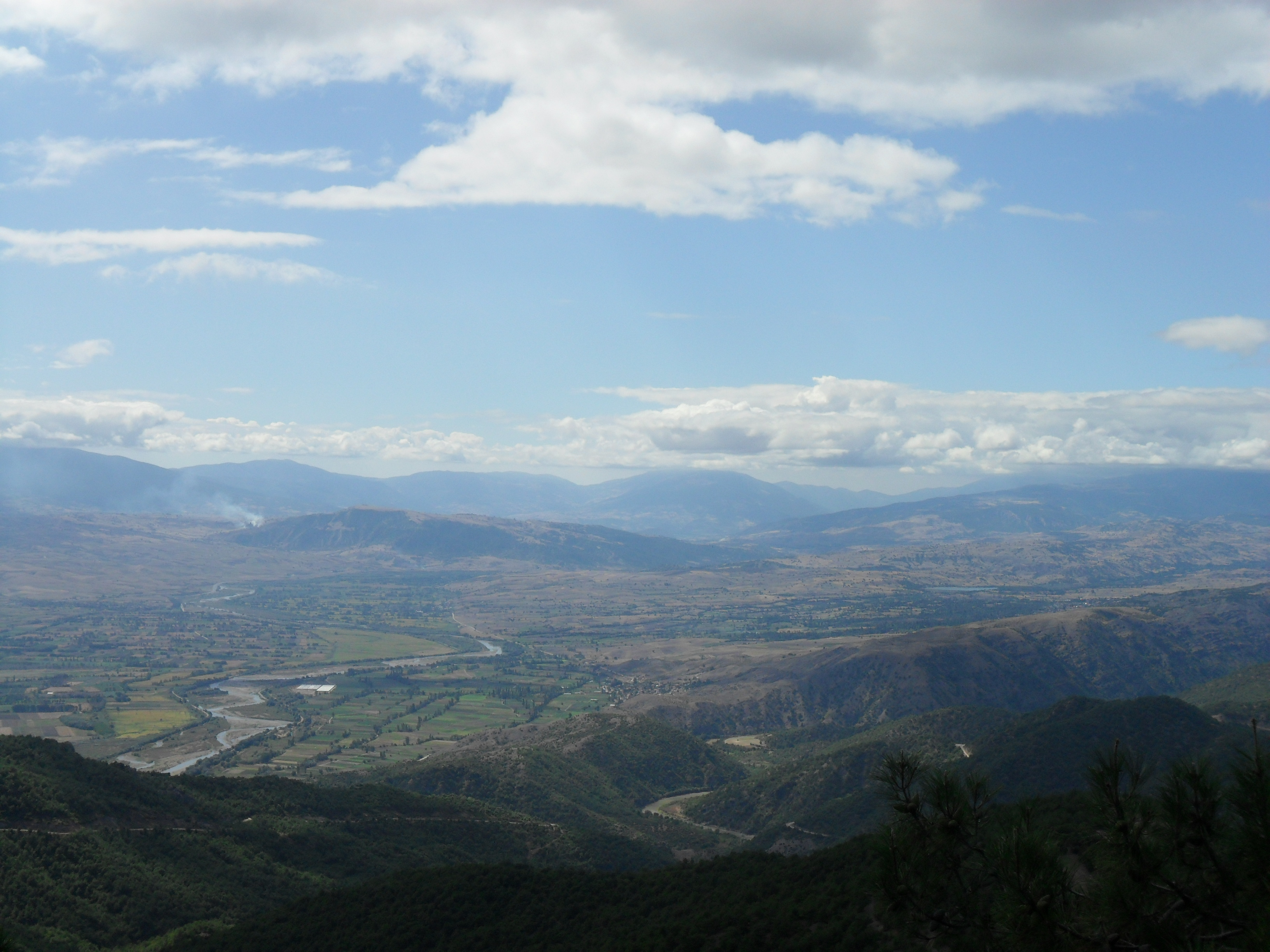 Erbaa ile Gökalan arasındaki alanda çekilmiş bir fotoğraf. Yeşilırmak'ın bir kolu ve tarım alanları görülmektedir.